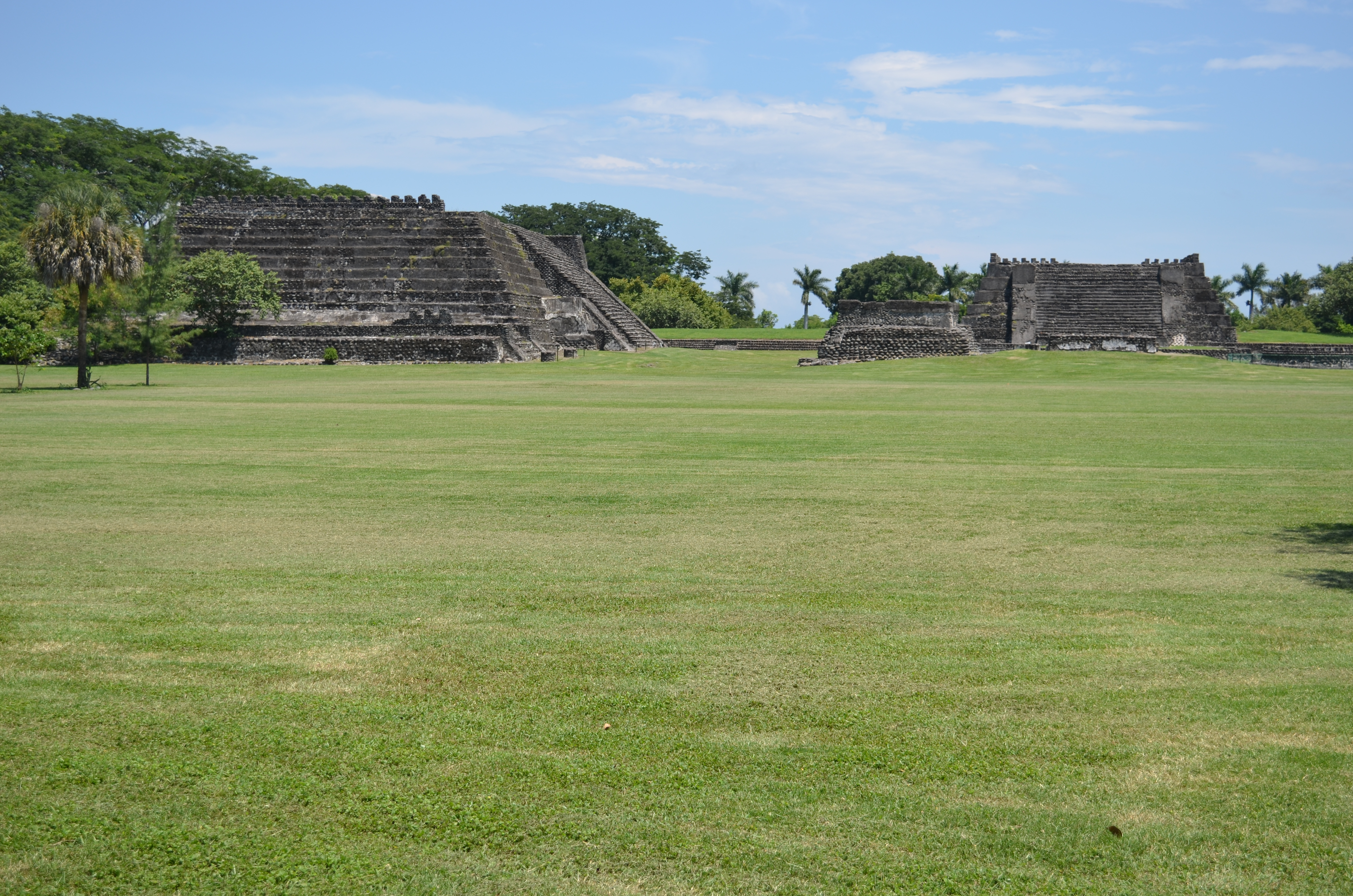 Vista general de la zona arqueológica de Cempoala en el estado de Veracruz